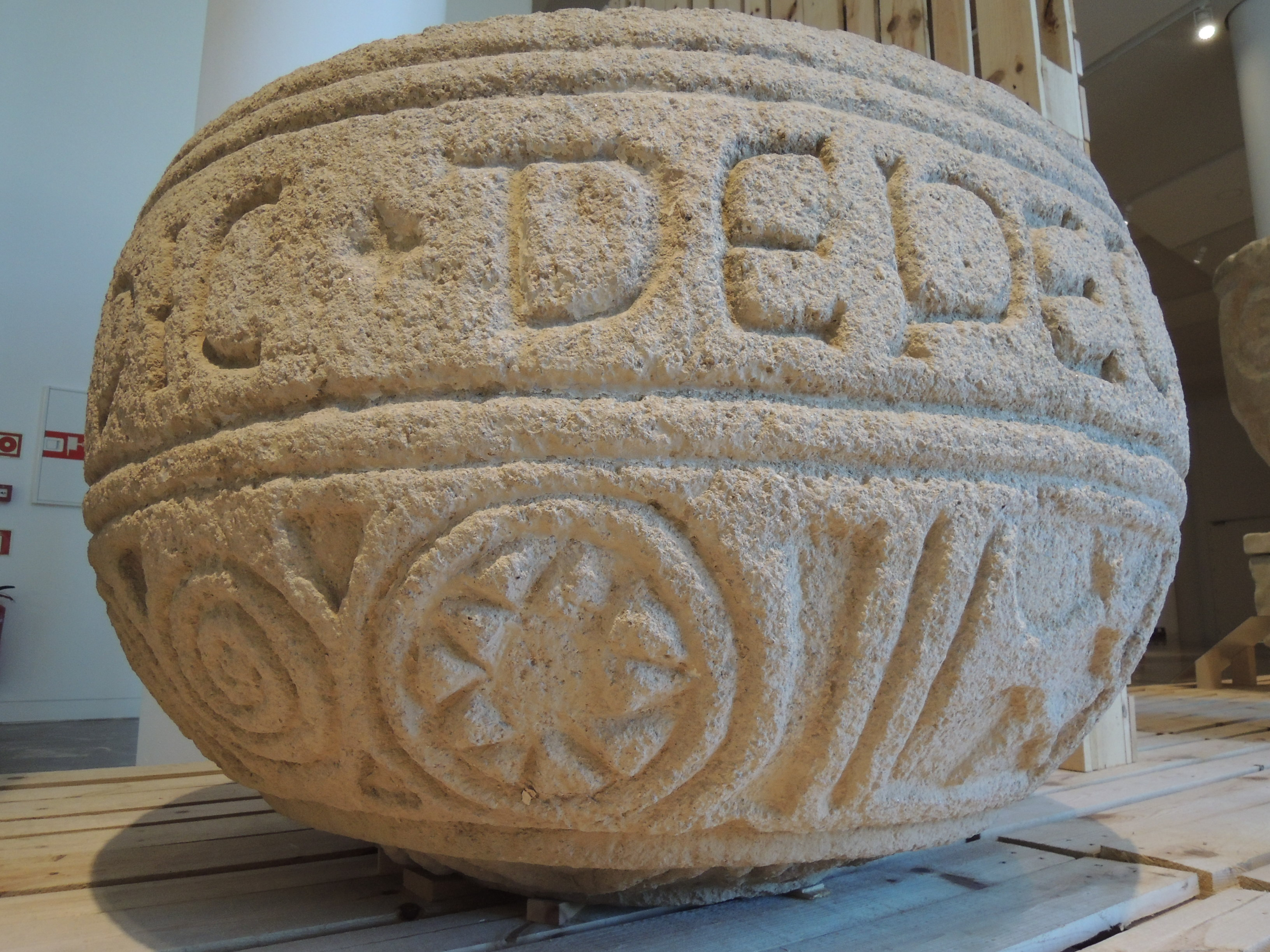 Pila Bautismal. Siglo XII. Iglesia de Santa María de Torbeo, Ribas de Sil (Lugo).